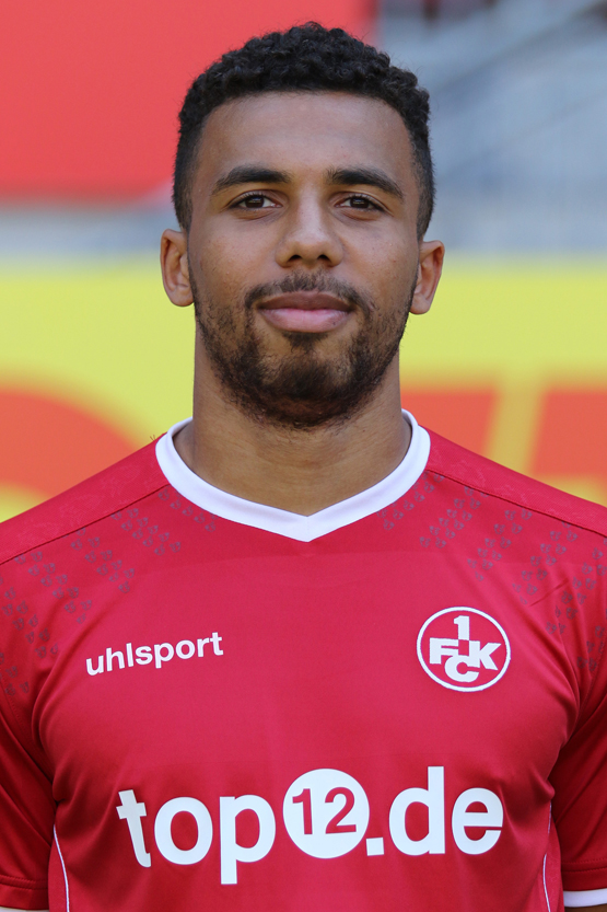 Leon Guwara